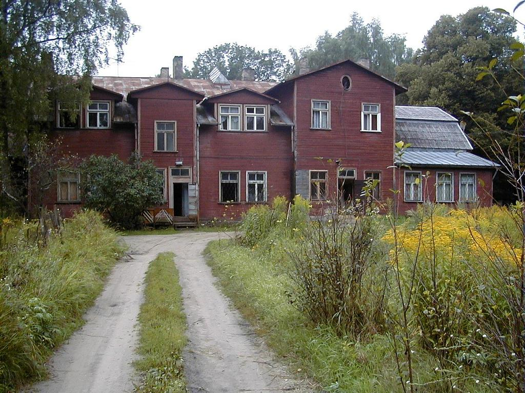 Bieriņu muiža Rīgā 2004-08-21